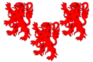 Vlag van Picardie Onder Wittelsbacher en Bourgondisch bestuur.